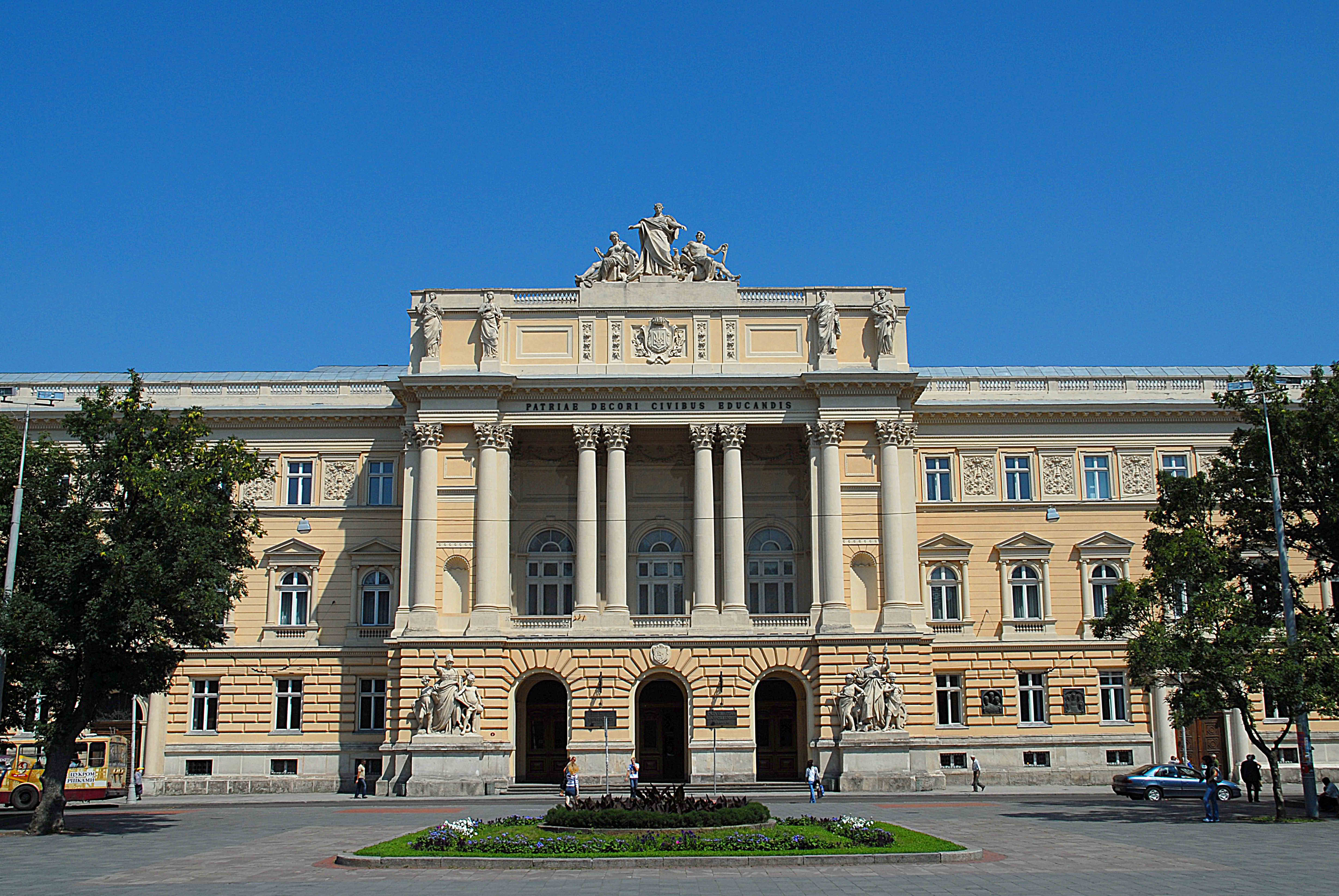 Головний навчальний корпус університету, в якому працювали видатні українські математики Зарицький М., Левицький В., Чайковський М. і вчені україністи Головацький Я., Огоновський О., Возняк М., Сімович В., Ковалик І. (Будинок галицького сейму), Львів, Університетська, 1